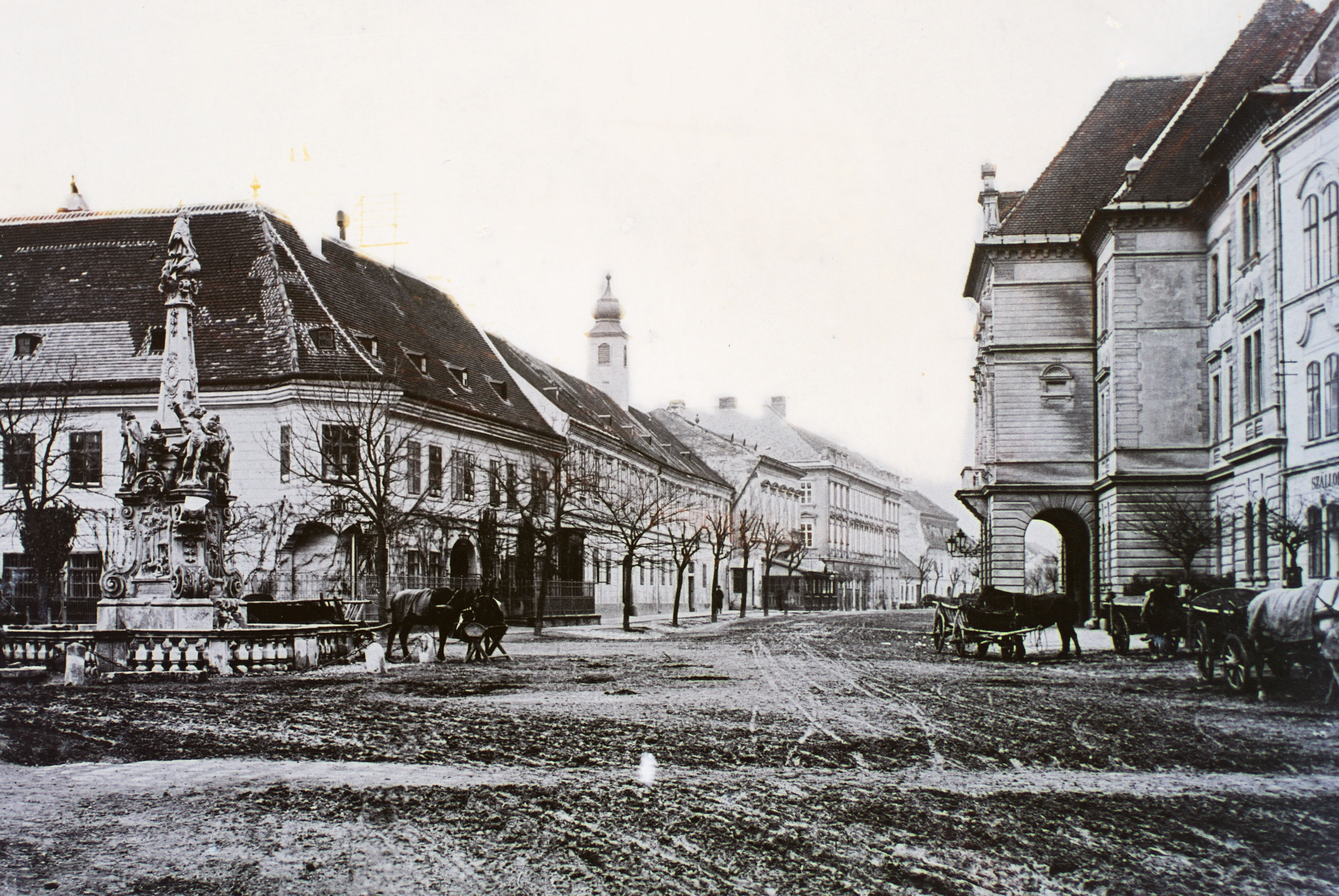 Deák Ferenc tér, a Nepomuki Szent János emlékoszlop mögött a Habsburg ház. Szemben a Fő utca a Vármegyeházával (ma Polgármesteri Hivatal). Location: Hungary Tags: sculpture Title: Deák Ferenc tér, a Nepomuki Szent János emlékoszlop mögött a Habsburg ház. Szemben a Fő utca a Vármegyeházával (ma Polgármesteri Hivatal).